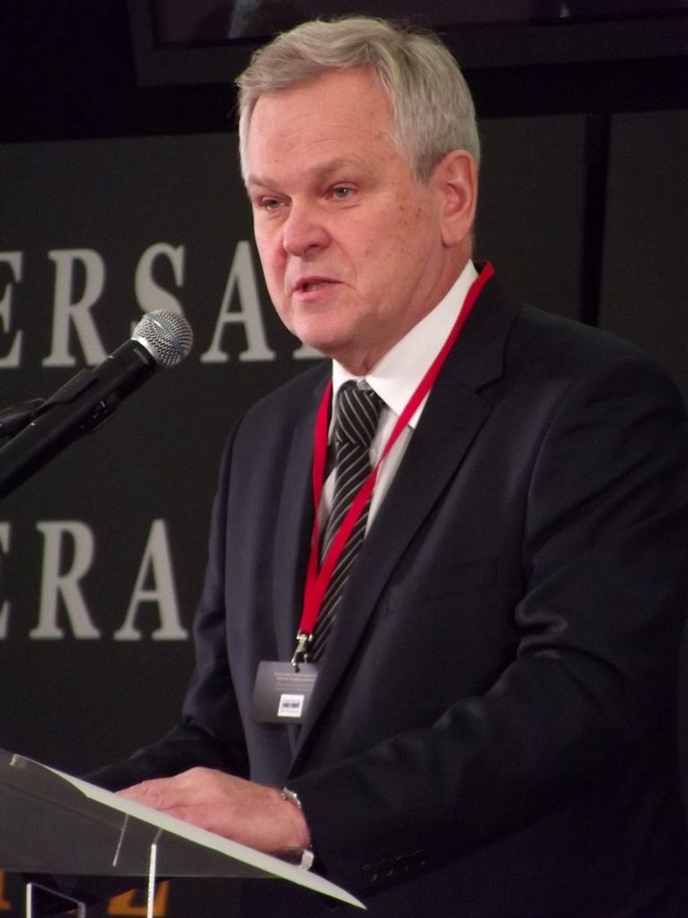 Zdjęcie zrobione podczas 69. rocznicy wyzwolenia KL Auschwitz-Birkenau.